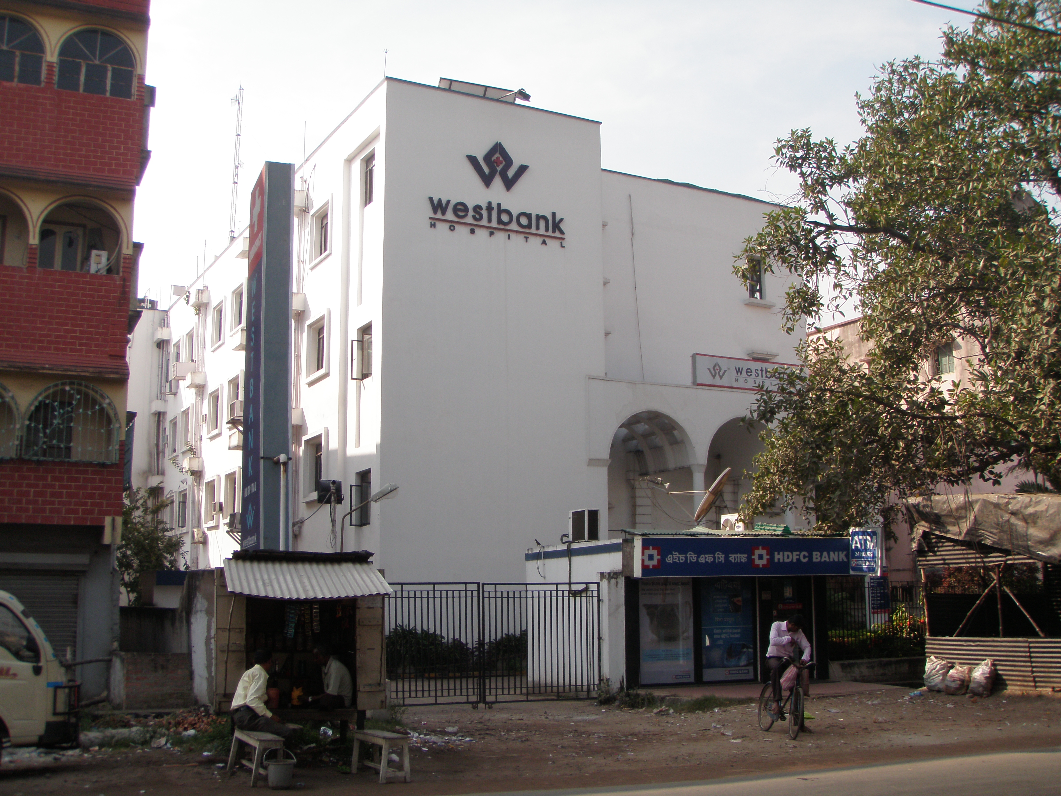 Howrah district, West Bengal